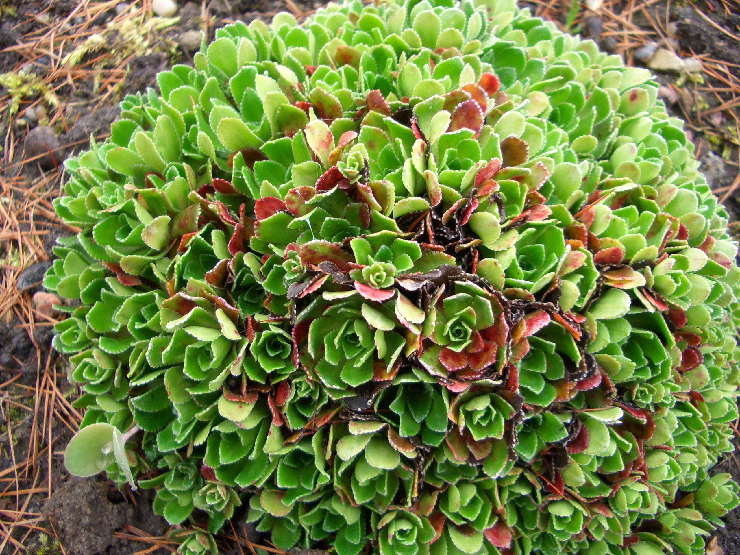 Rispen-Steinbrech (Saxifraca paniculata)